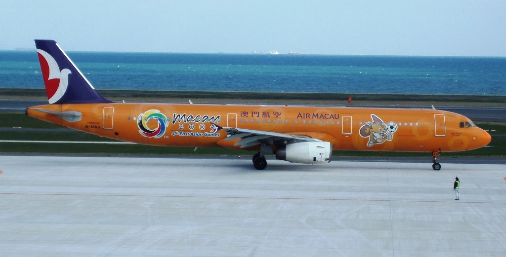 エア・マカオ A321-200型機 撮影者:Cipher01(投稿者本人) 撮影地:北九州空港 Category:航空機画像